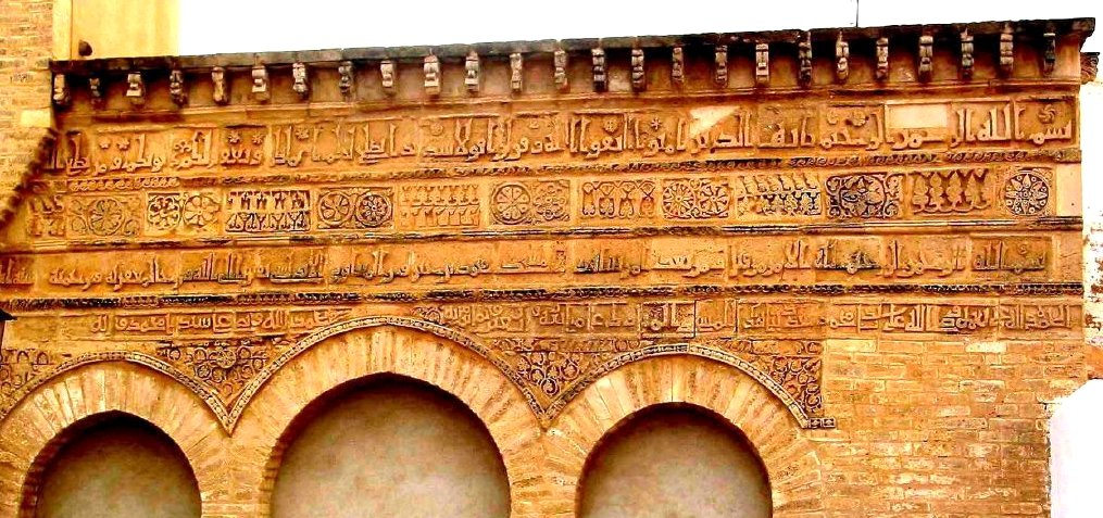 Fassade der Muhammad-Ibn Khairun-Moschee (Kairouan)